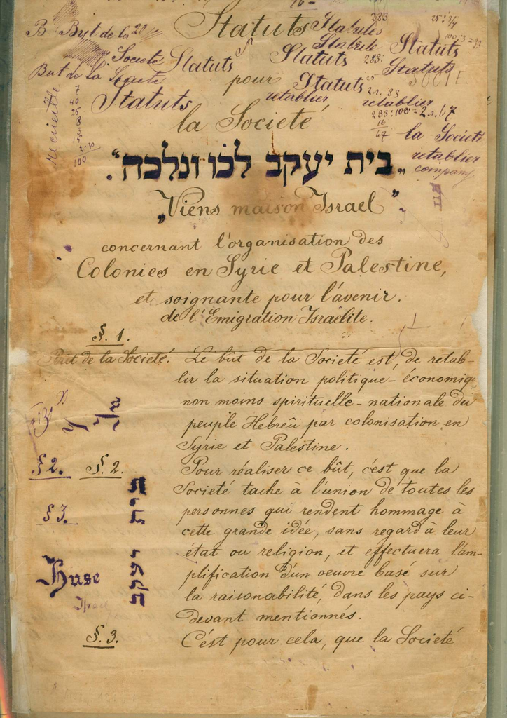 תקנות ביל"ו 1882